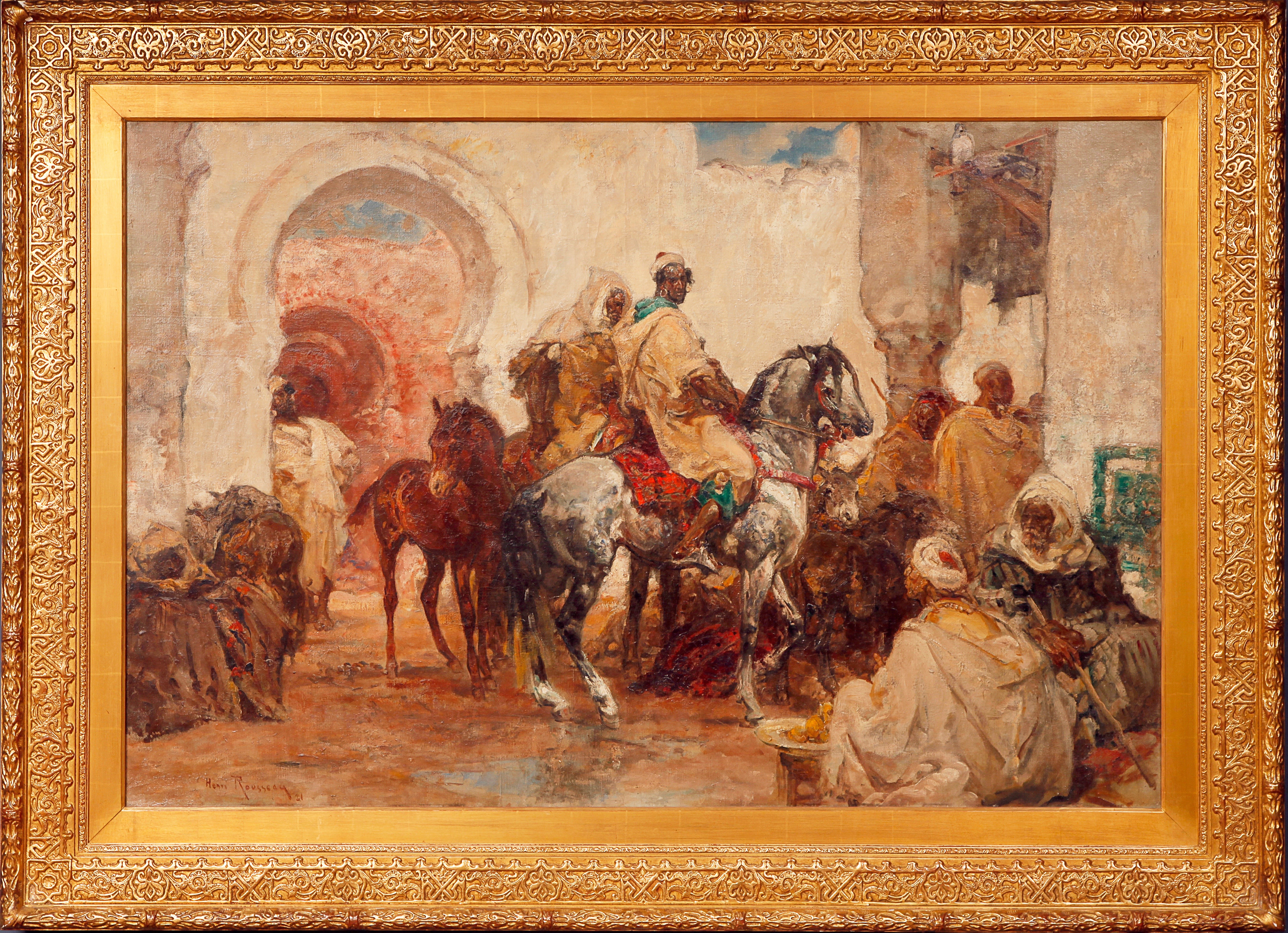 Entrée au Village, 1921 Henri Emilien Rousseau Oil on Canvas 98.5 by 147.3 cm Ger Eenens Collection The Netherlands